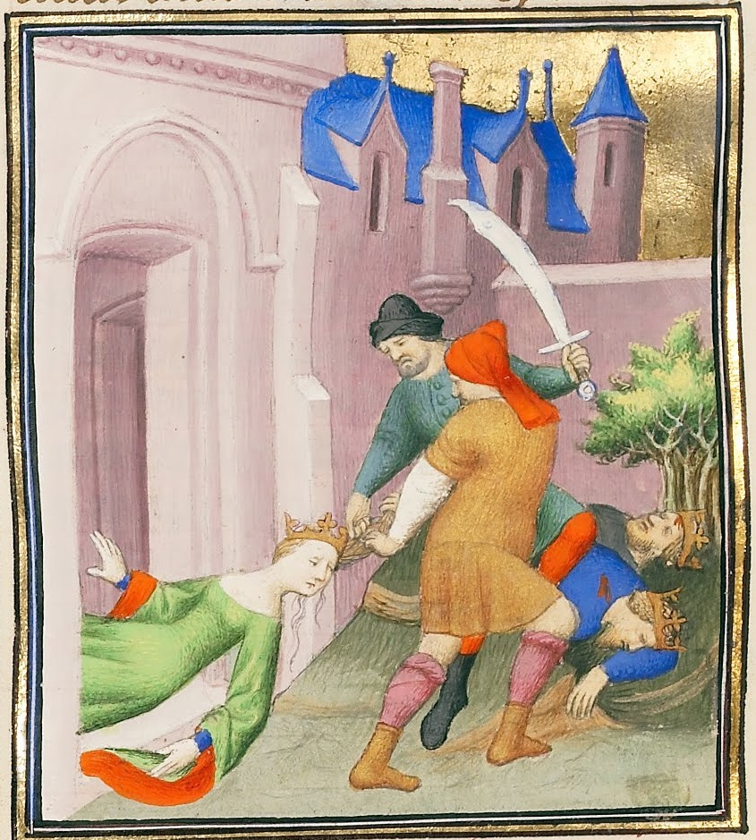 Середньовічна мініатюра зображуюча вбивство дітей Арсіної II.